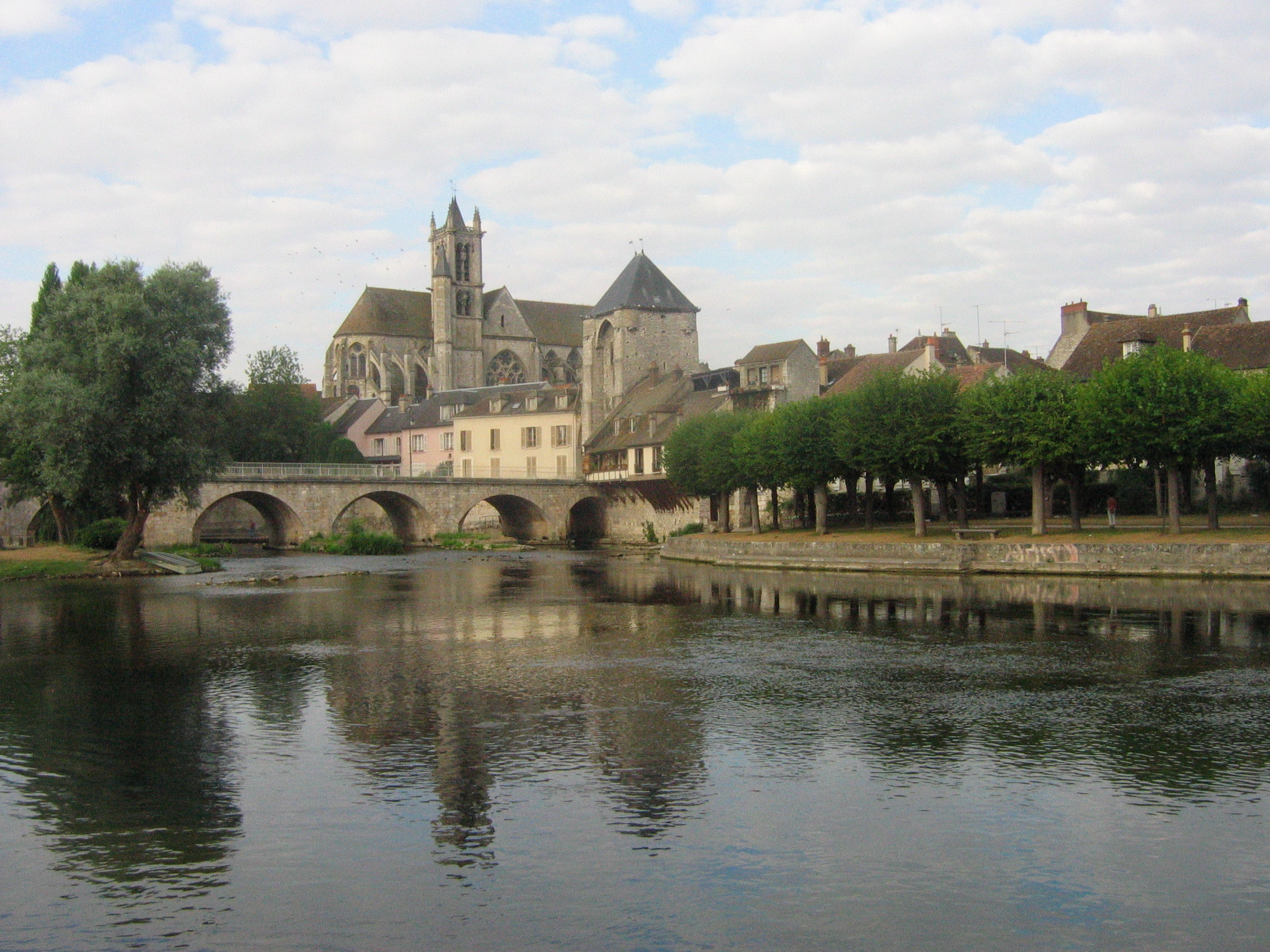 Moret-sur-Loing, Seine-et-Marne, France : vue du pont